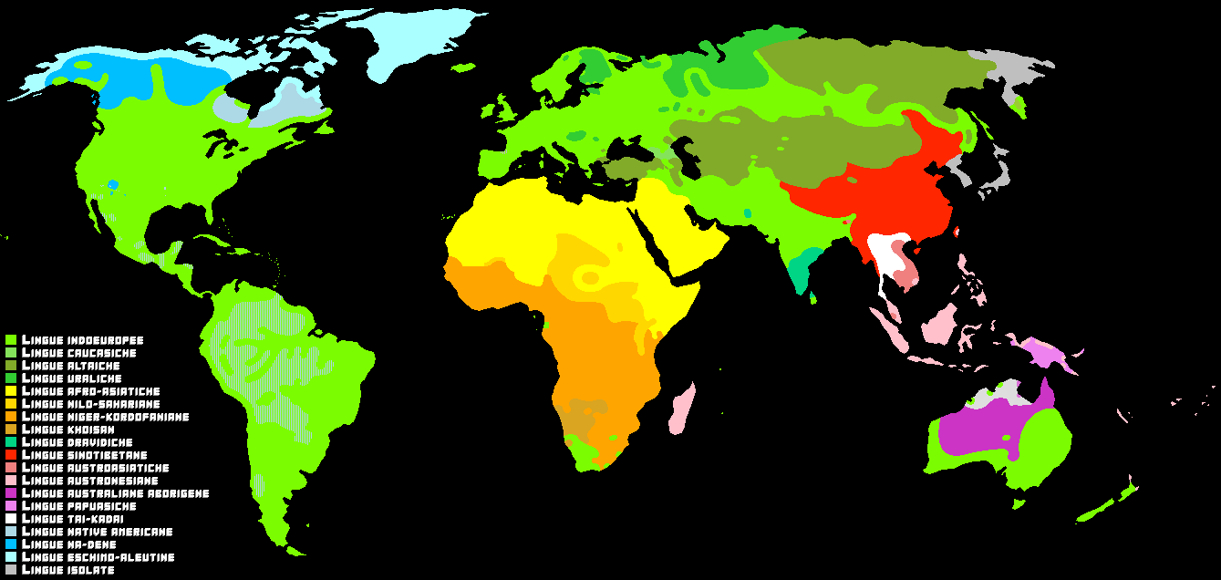 famiglie linguistiche del Mondo divise per colore